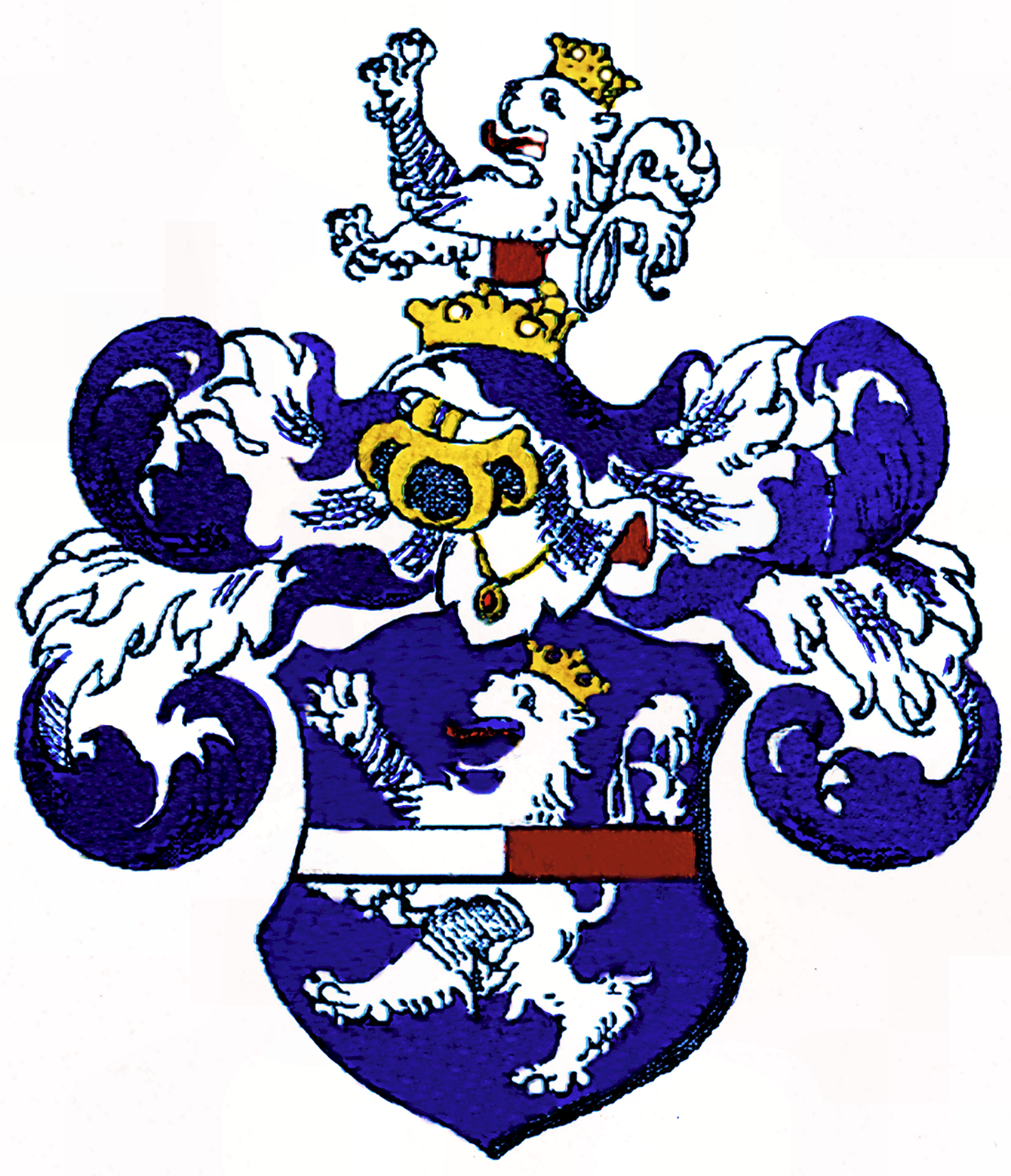 Stammwappen der Grafen von Wallis seit dem 13. Jahrhundert